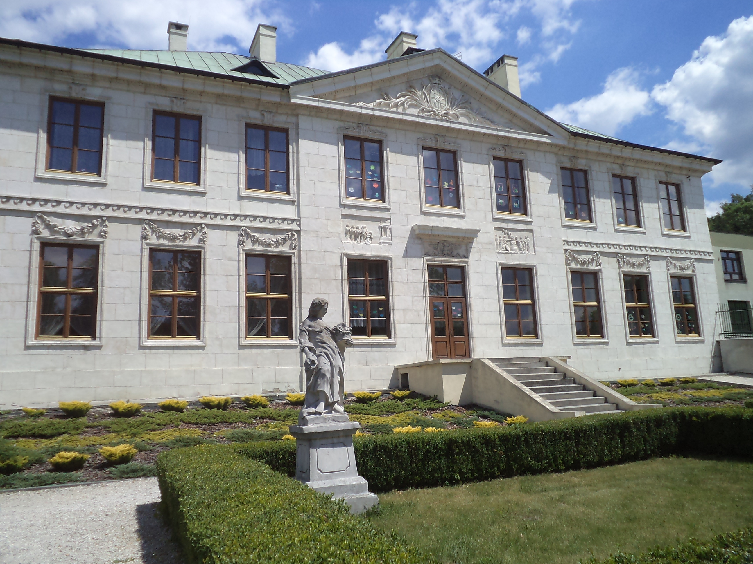 Pińczów, pałac Wielopolskich, lata 1773-1784